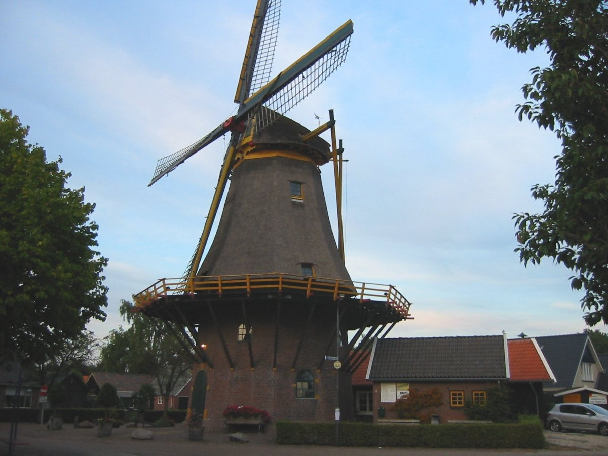 De Hoop/ Mölle van Buursink: Achtkante stellingmolen schuin van opzij gefotografeerd (opmerking: Foto gemaakt in het kader van het project Actualisering Monumentenregister (AMR).)